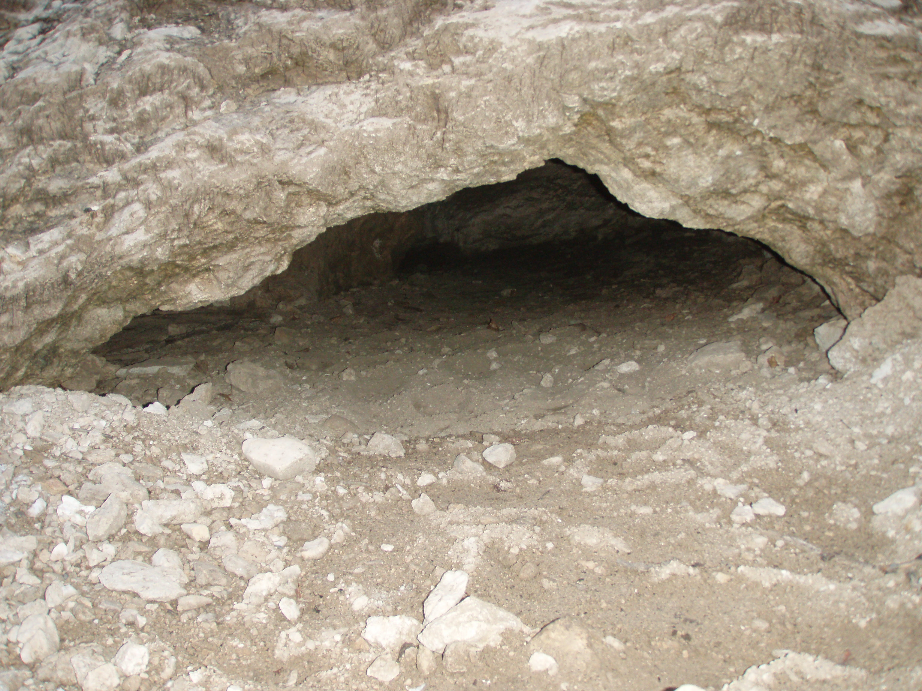 Entrada de la Cueva del Gorgocil